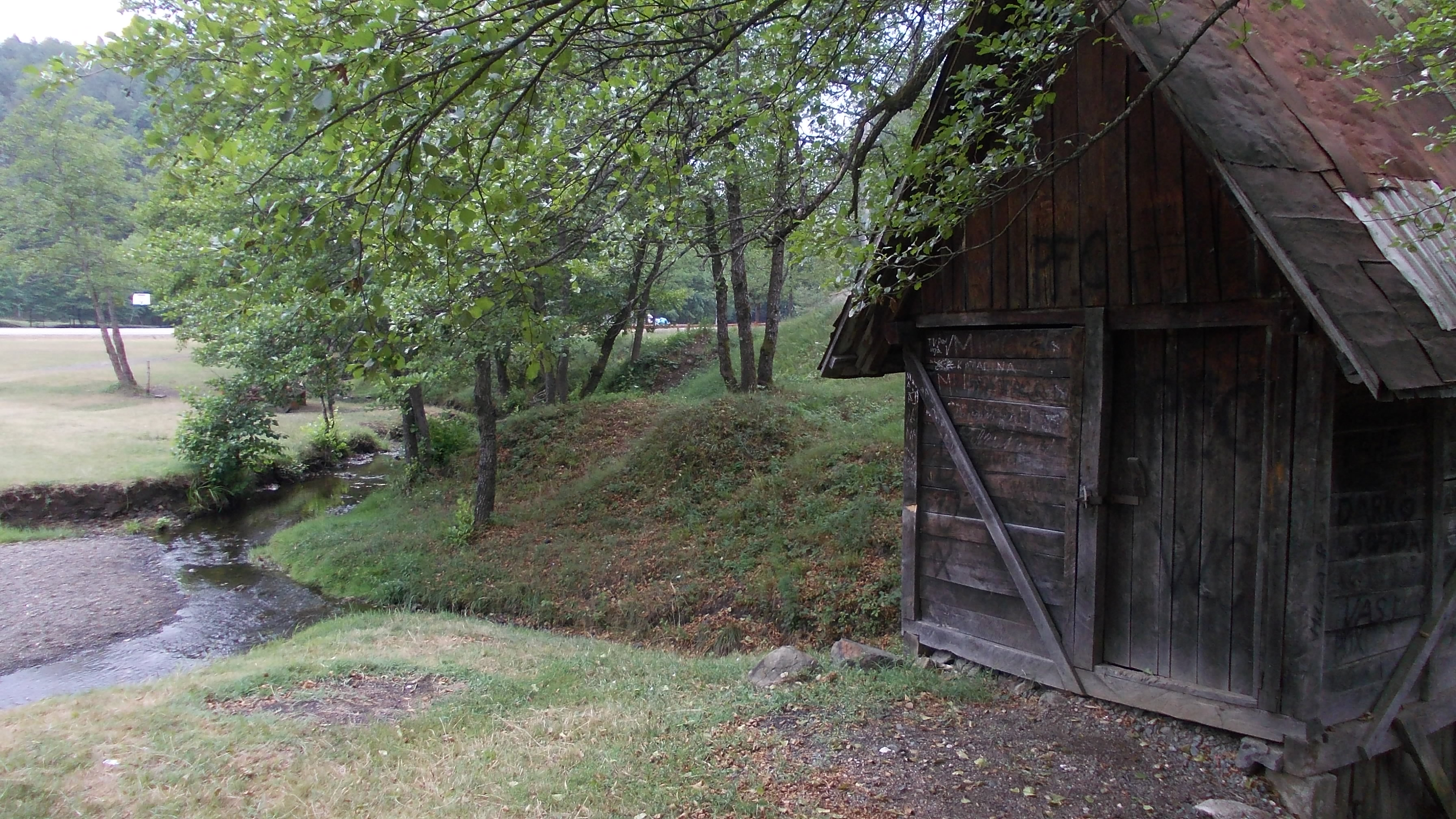 стара воденица, Јошавка Горња, општина Челинац